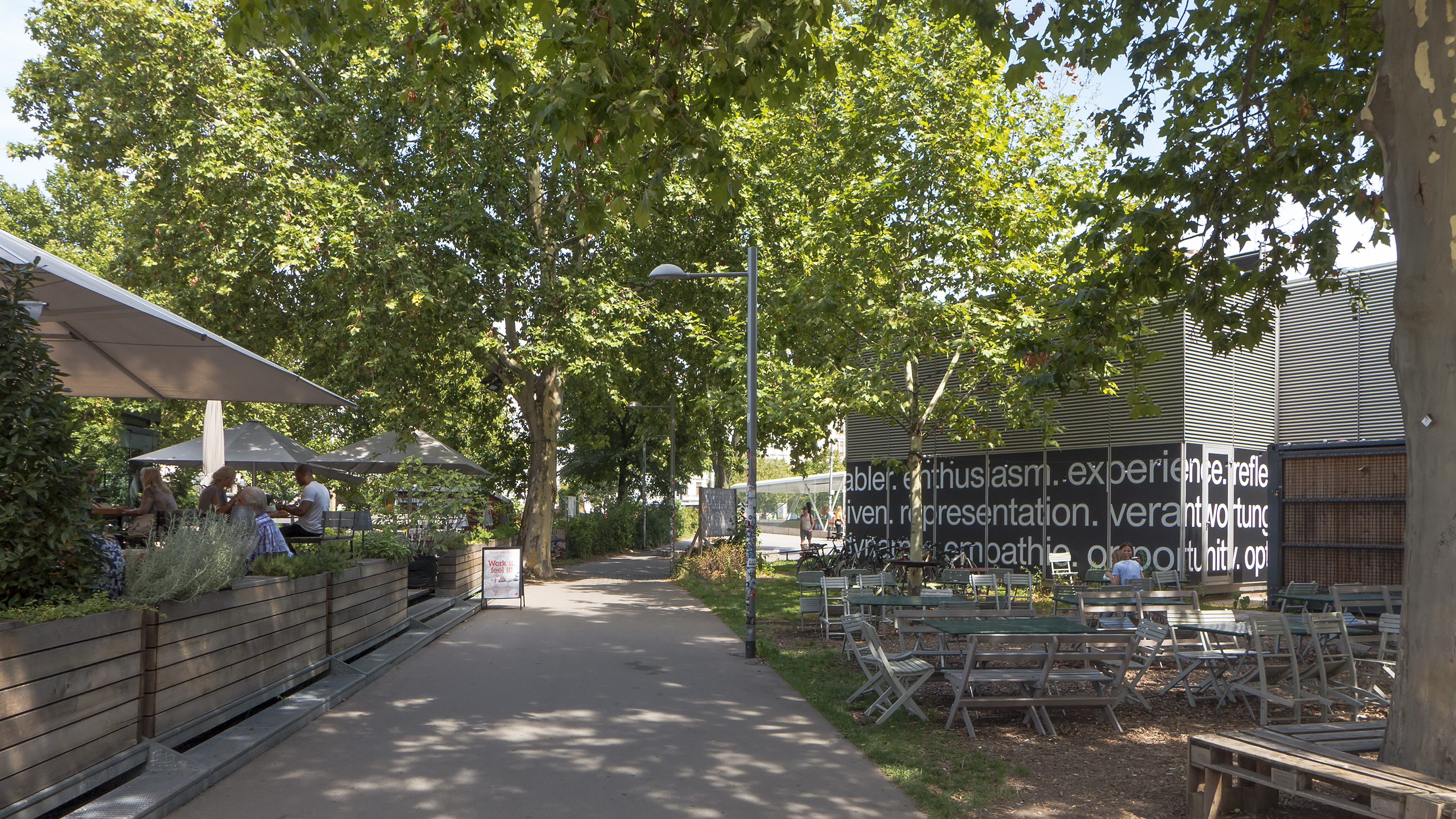 Rosa-Mayreder-Park in Wien 4